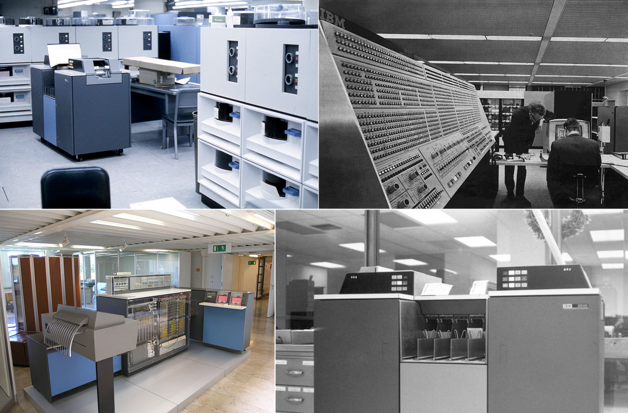 IBM 360系统本身及周边设备